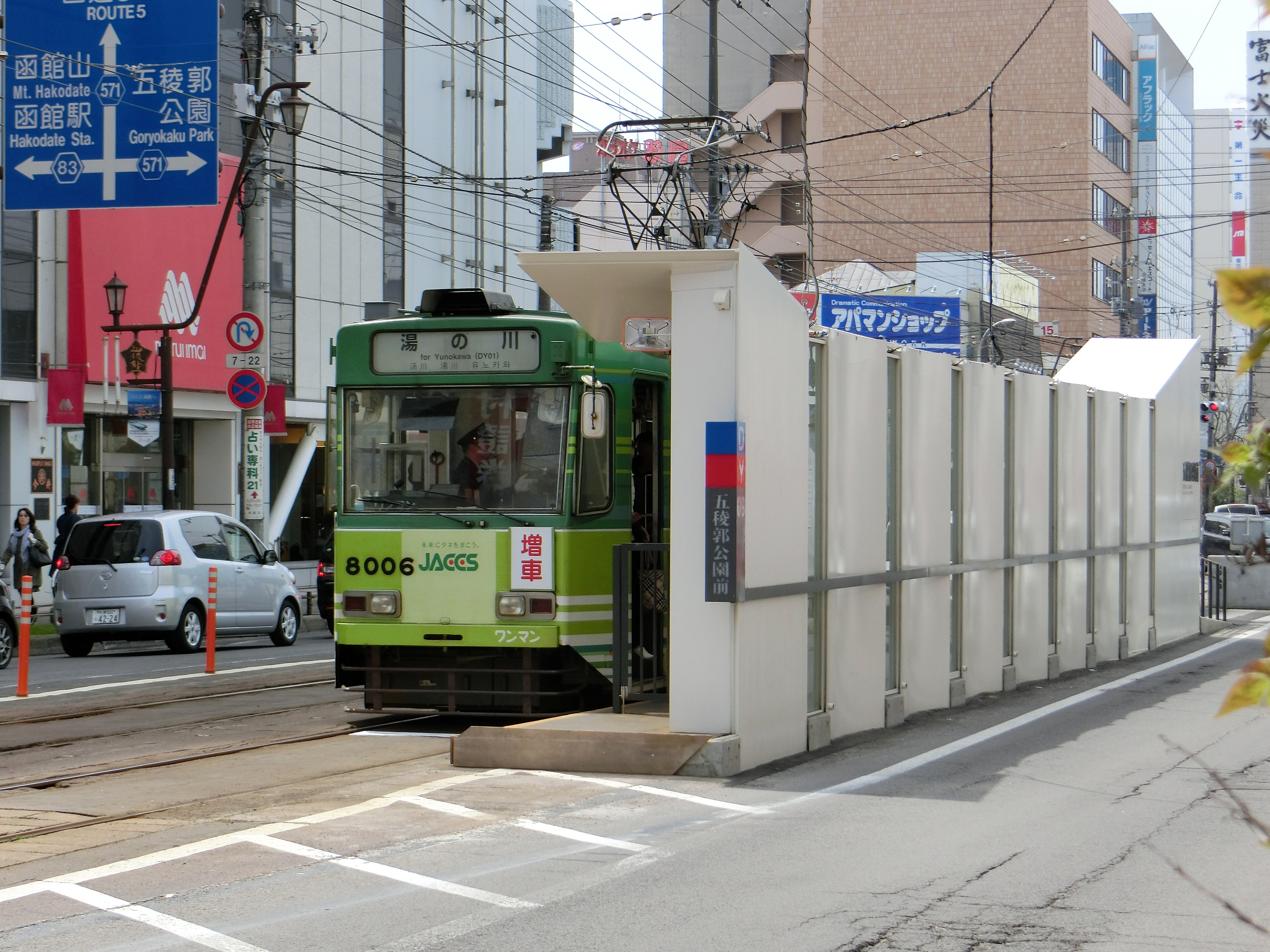 函館市電五稜郭公園前停留場（2016年5月）